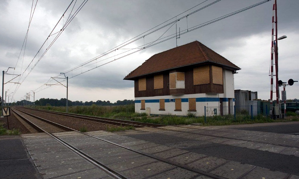 Nastawnia przy skrzyżowaniu torów z drogą do Szczepanowa zabita przysłowiowymi dechami.